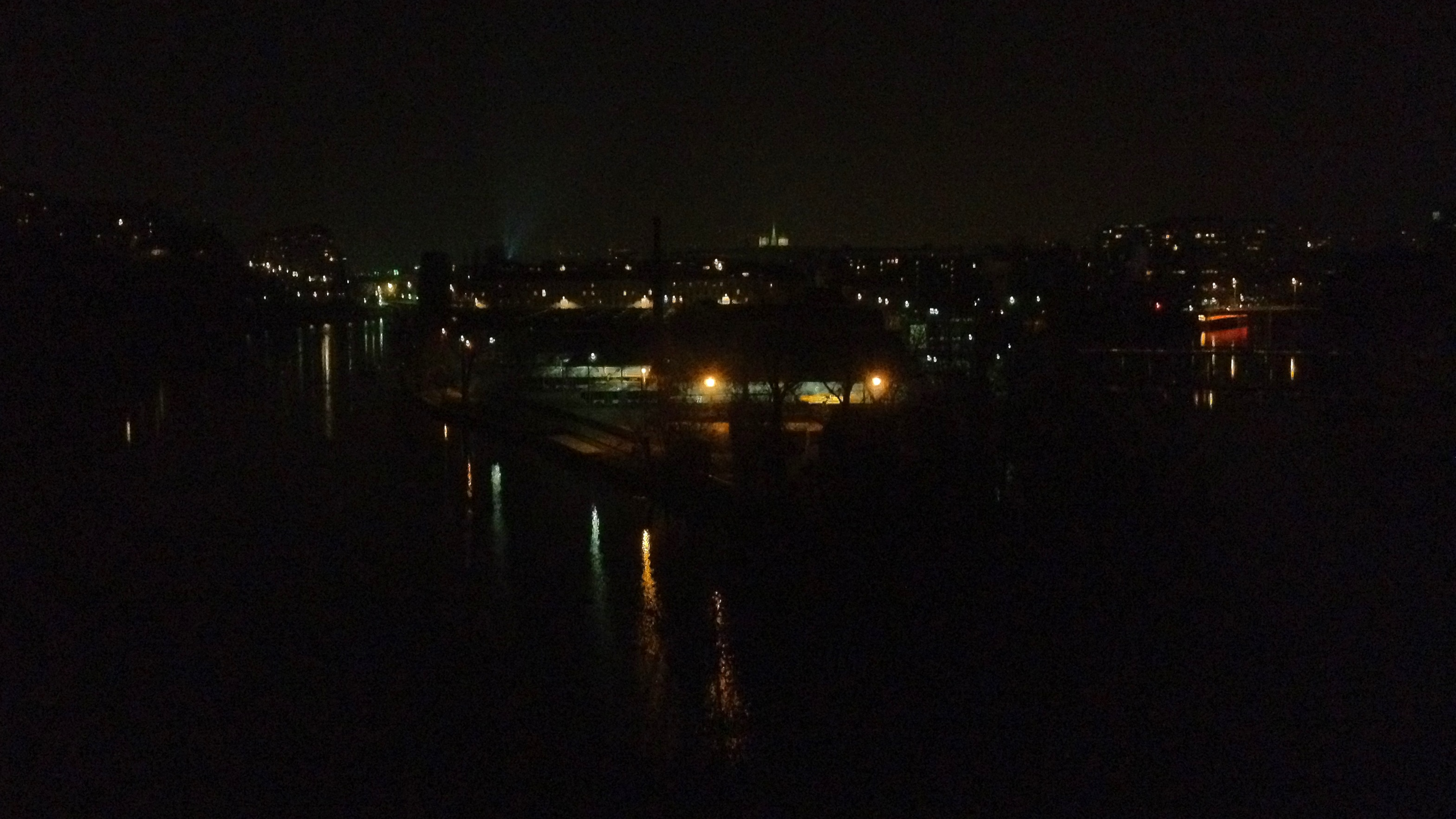 Confluence du Rhône et de l'Arve à Genève, mars 2012